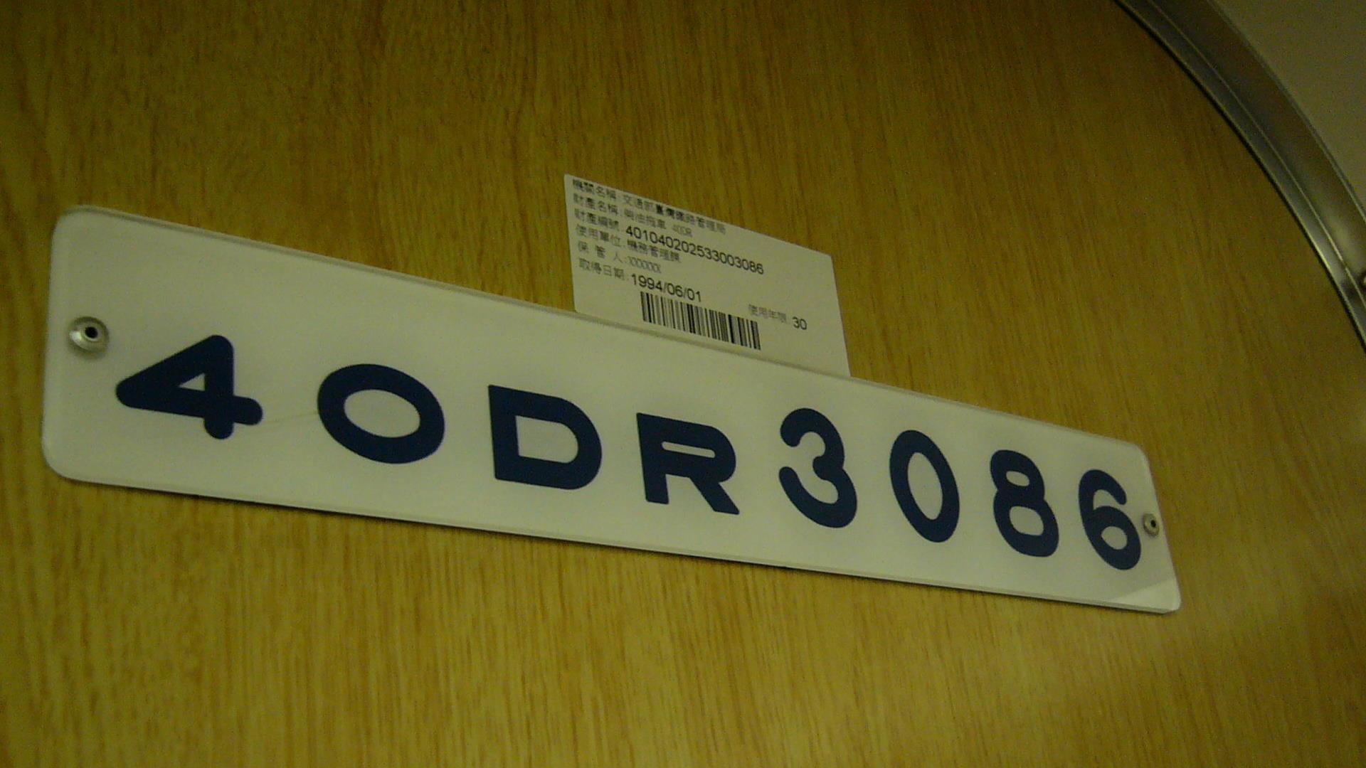 中文（台灣）: 臺灣鐵路管理局柴聯車40DR3086車號銘板。